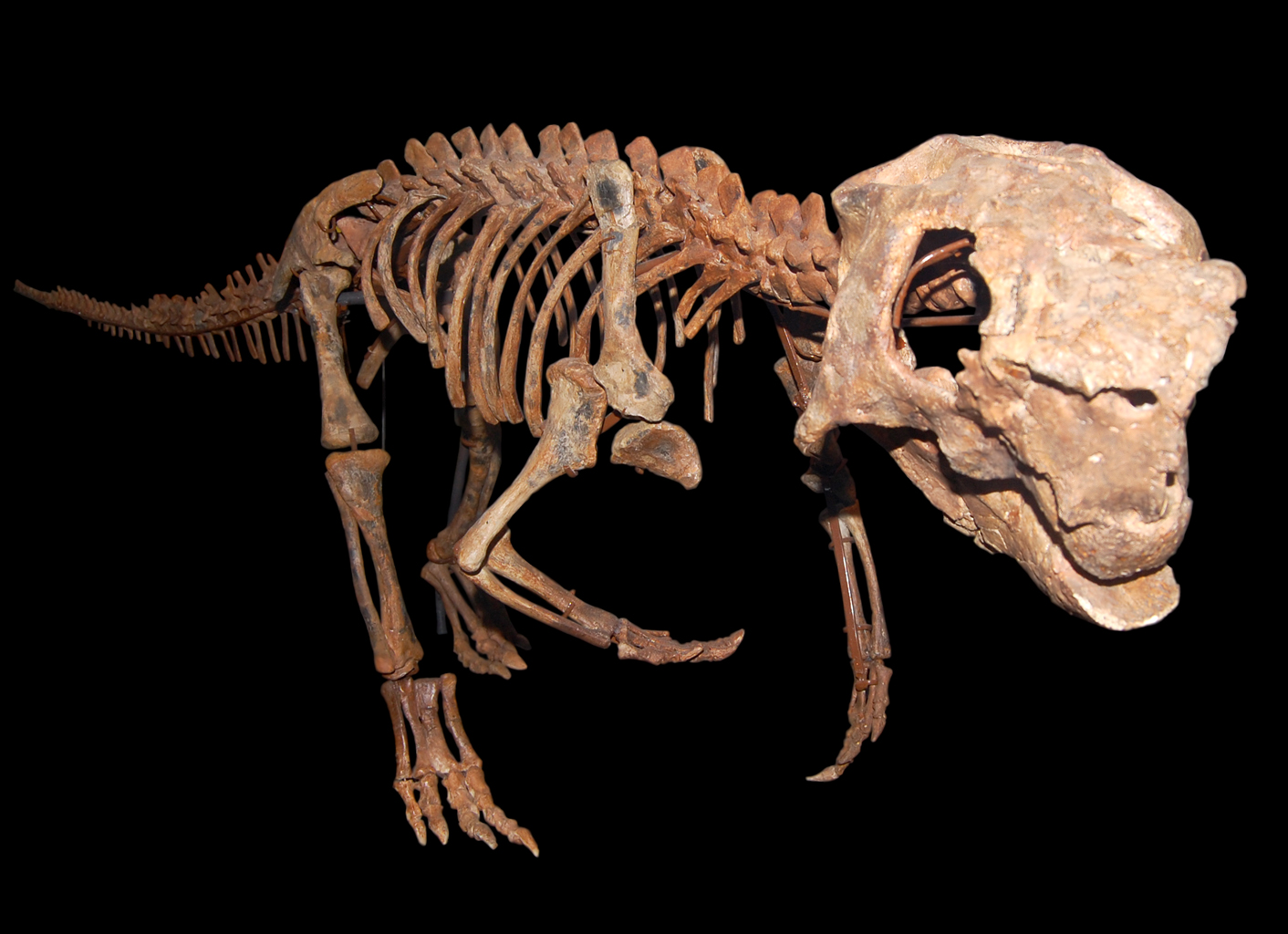 Naturhistorisches Museum Wien